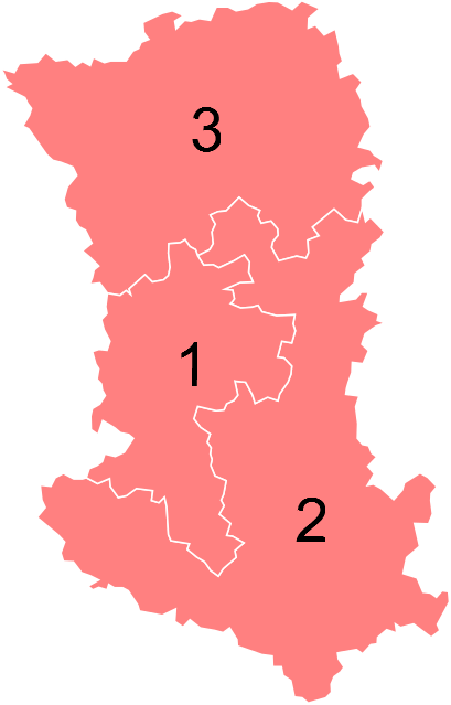 Résultats des élections législatives des Deux-Sèvres en 2012